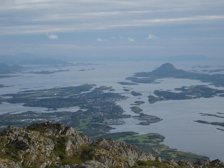 Brønnøysund, her sett fra Mofjellet, strekker seg ut som en halvøy omkranset av øyer, holmer og skjær.